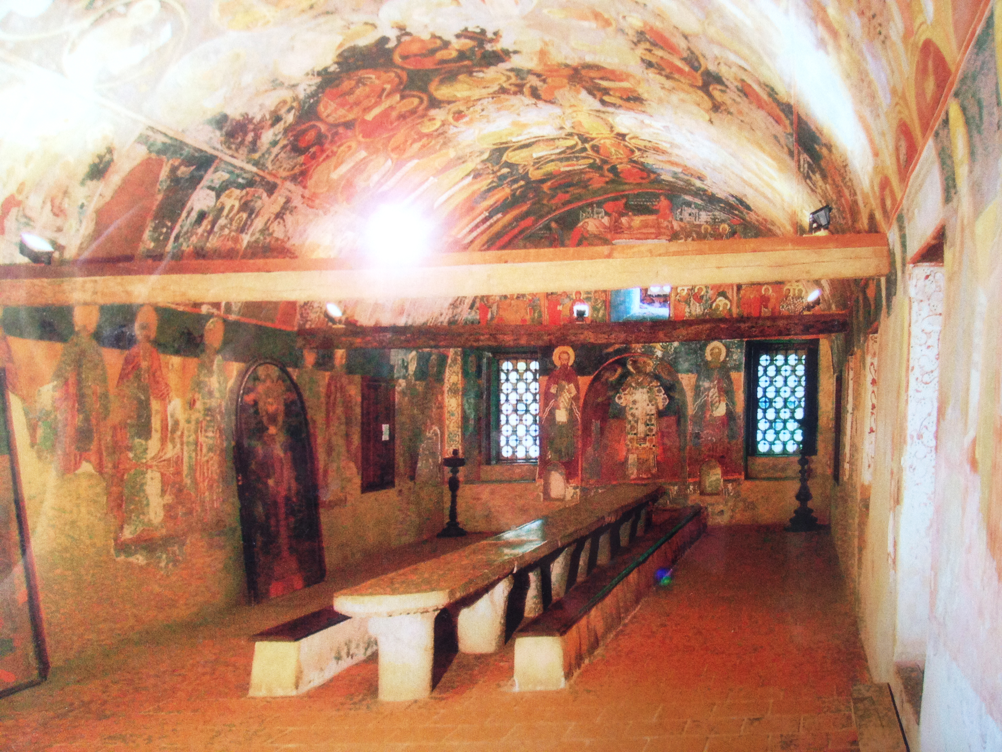 il refettorio del monastero di Bachkovo, Bulgaria